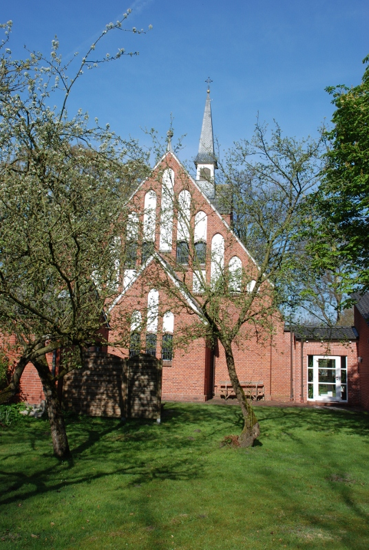 Ostseite der Kirche In Ihlowerfehn, Ostfriesland